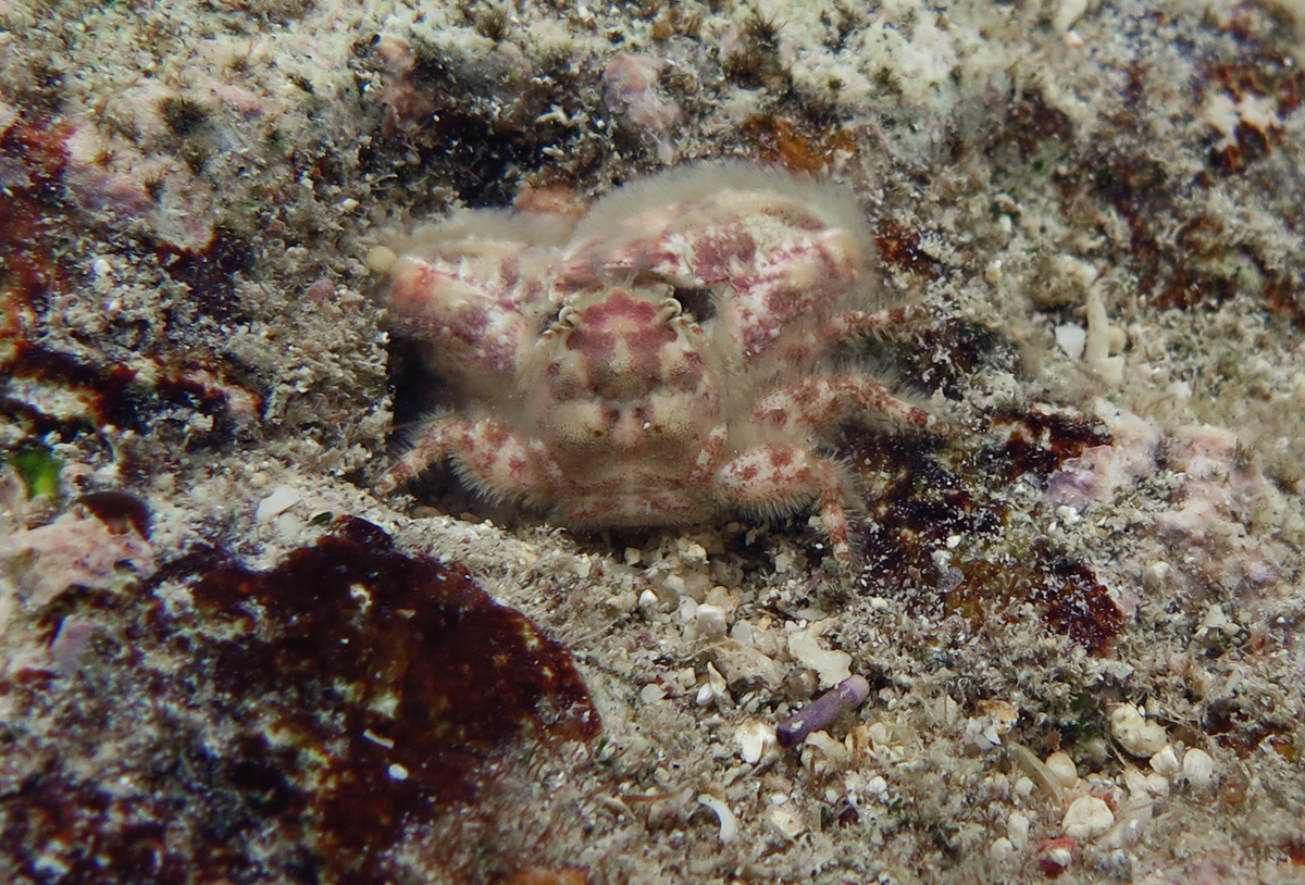 Un crabe porcelaine Petrolisthes tomentosus (Galatheoidea) à la Réunion.